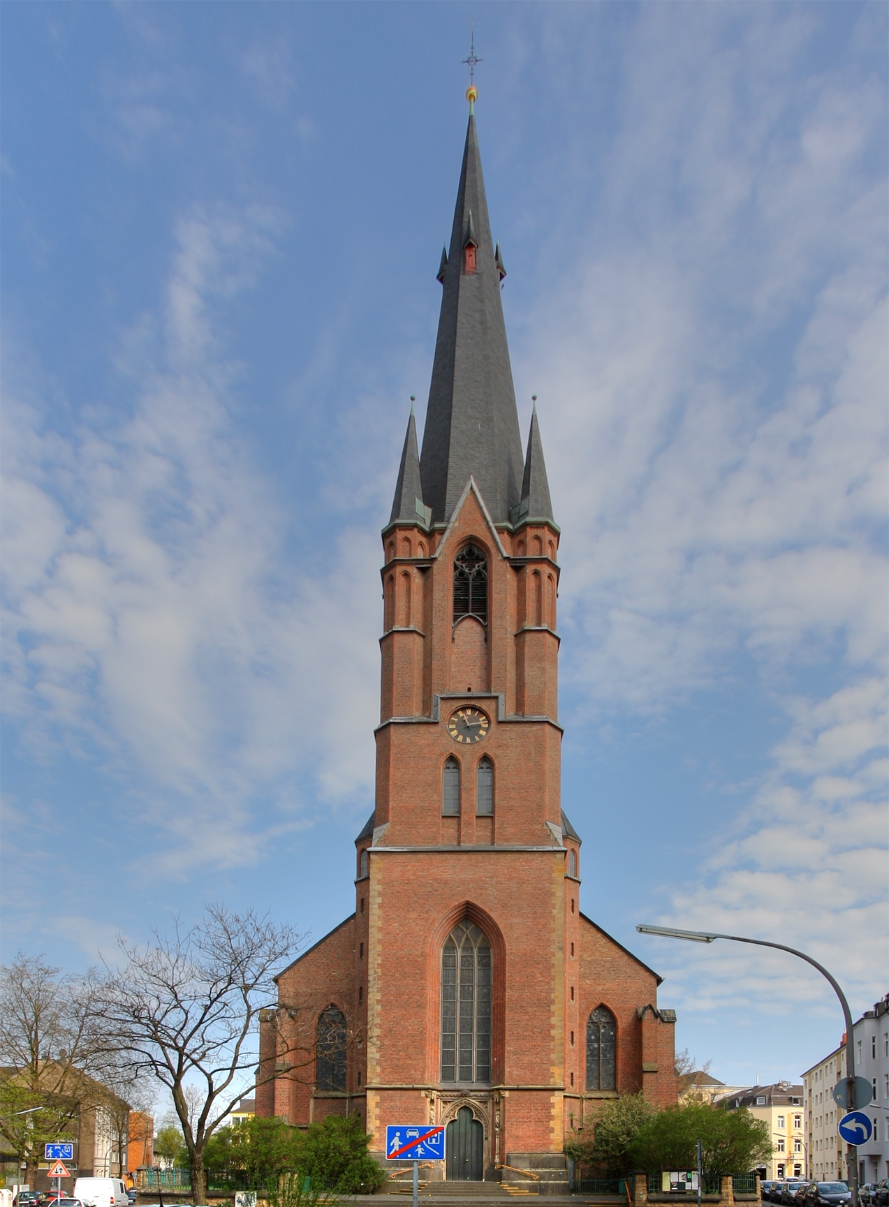 Kirche St. Joseph in Köln-Kalk, Wiederaufbau 1949-1952 durch Architekt Gottfried Böhm